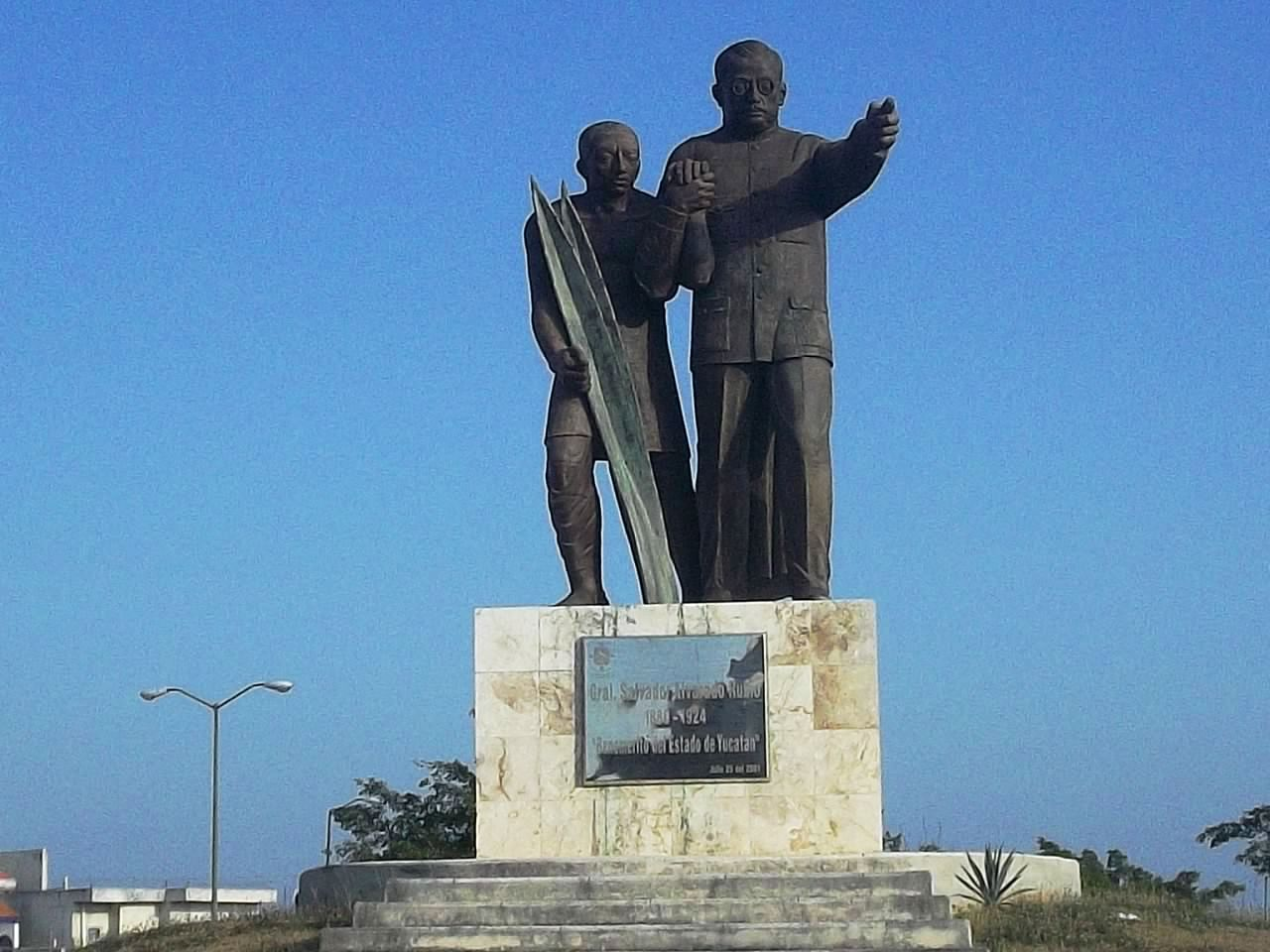 Monumento al general Salvador Alvarado Rubio en Mérida, Yucatán.